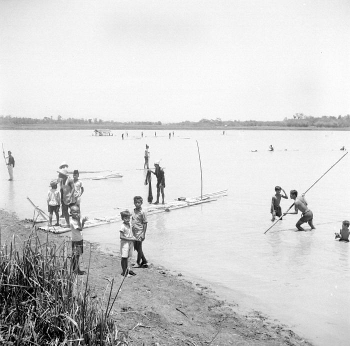 Negatief. Vissers op bamboevlotten in meer ten noorden van Pagaden, bij Purwakarta, West-Java